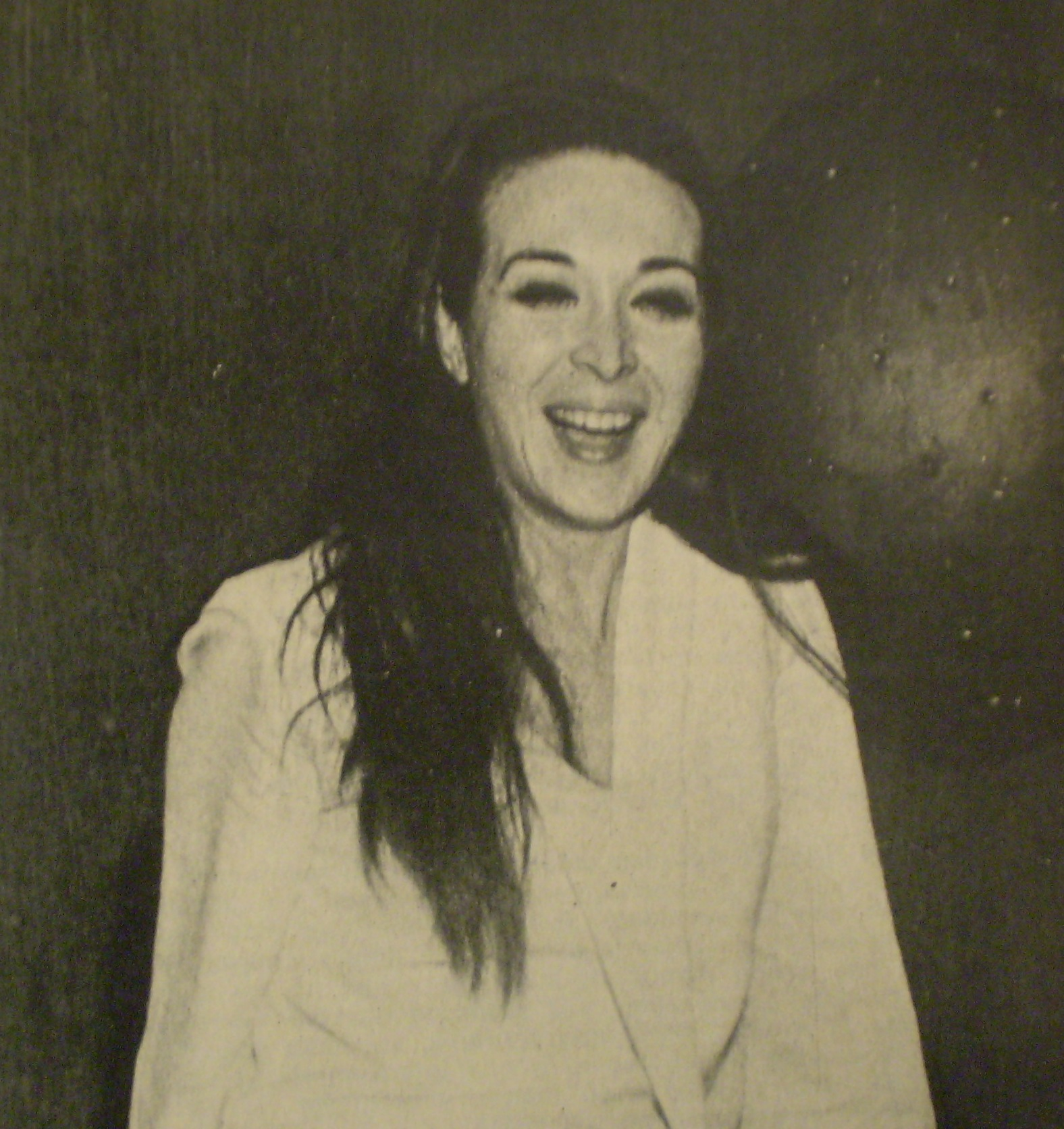 Mabel Manzotti